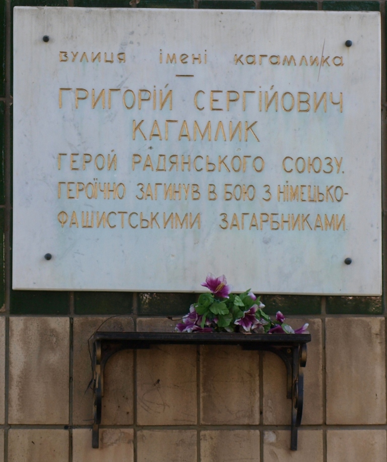 Полтава вулиця Кагамлика